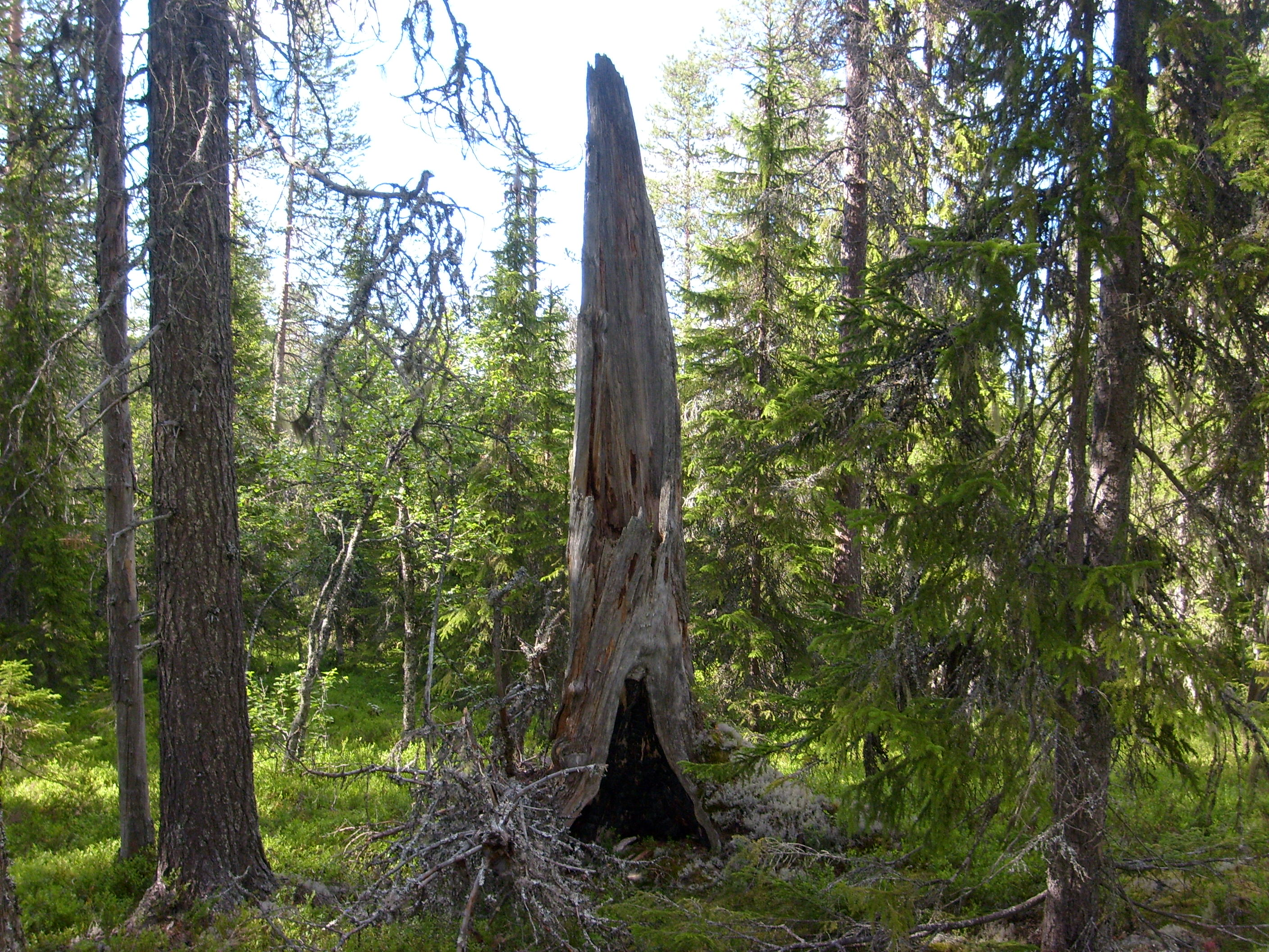 Stort brandljud Långsjöblik